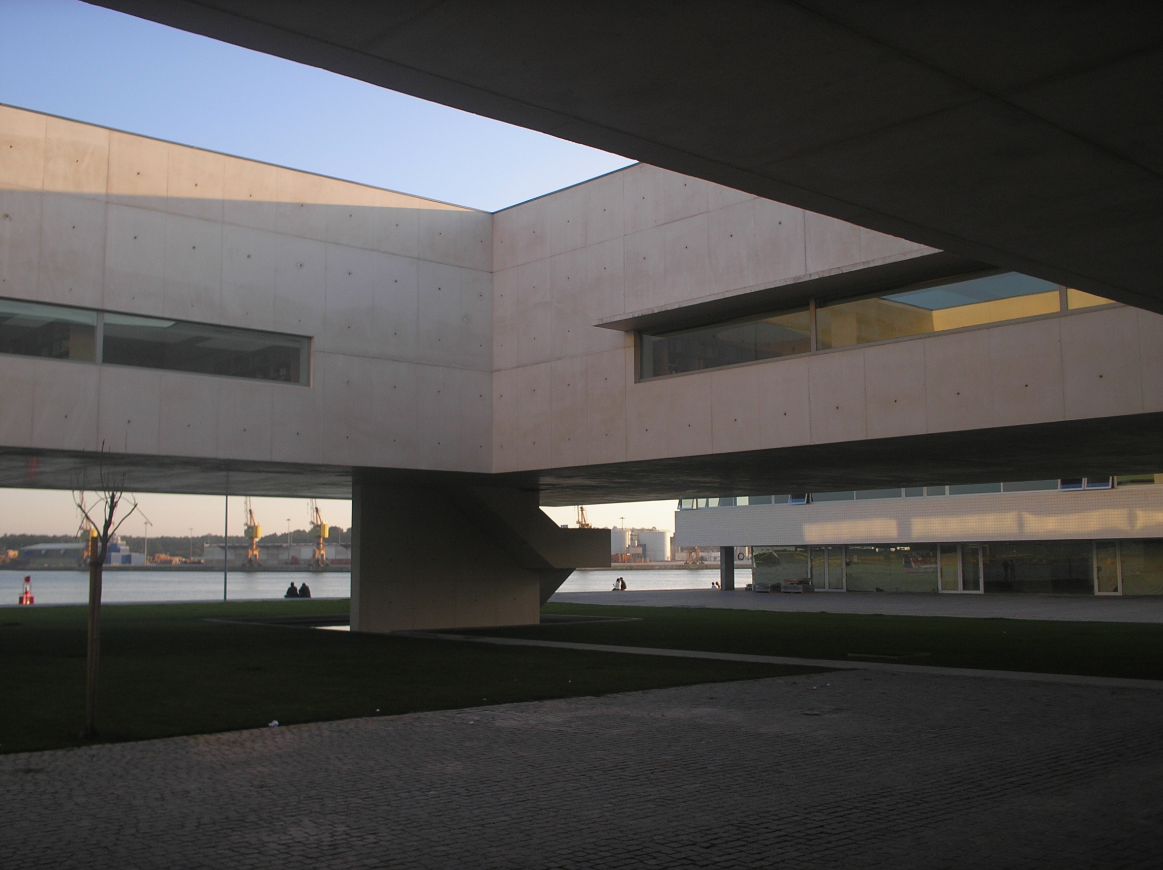 Biblioteca Municipal de Viana do Castelo, Viana do Castelo, Portugal. Projectada por Siza Vieira.